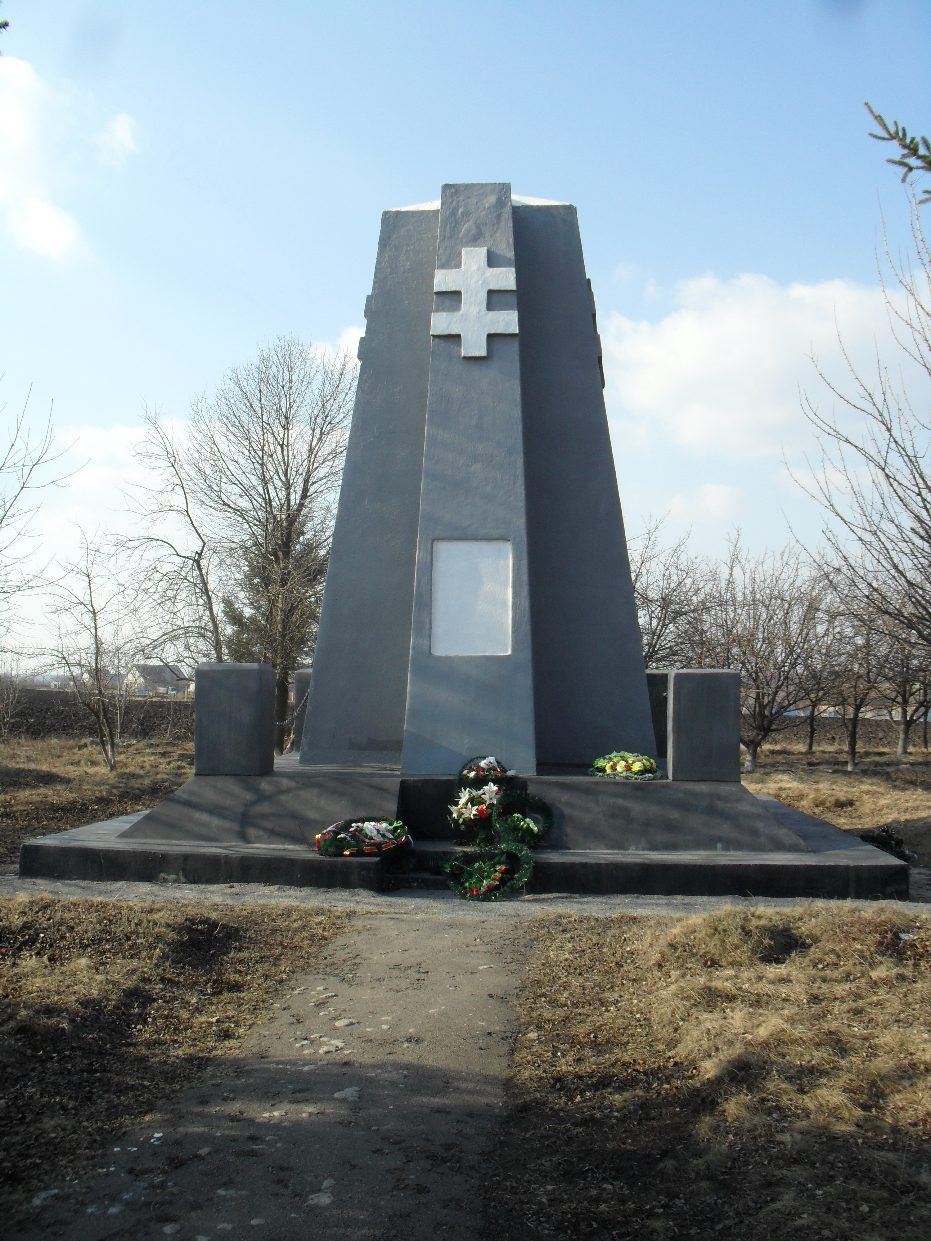 Словацький монумент під Липівцем